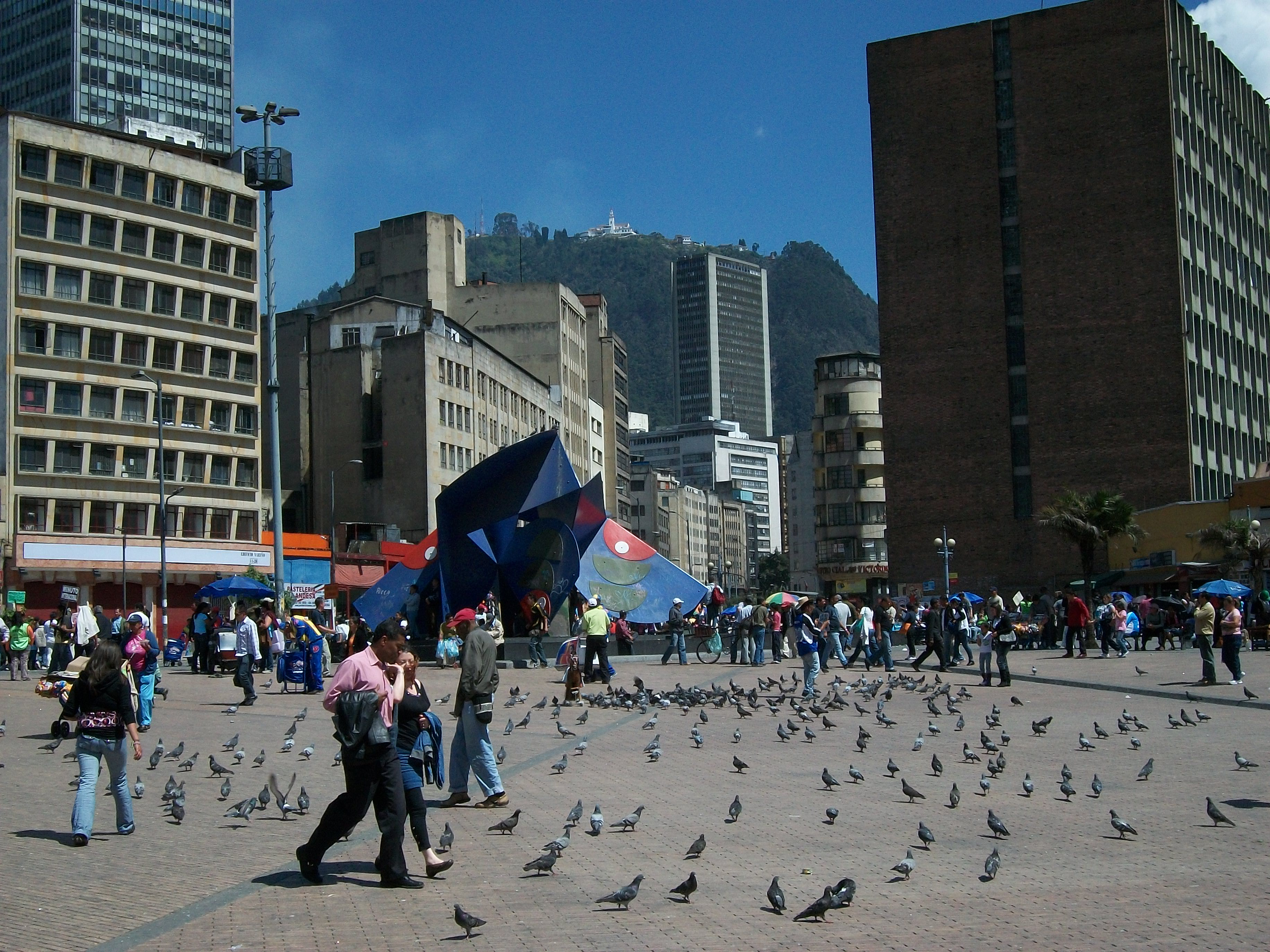 Plaza San Victorino, Bogotá con escultura de Edgar Negret, "Mariposa".